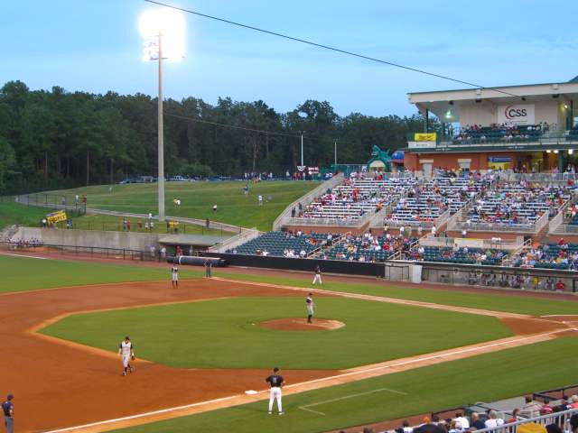 Photo by Nick Juhasz. 08:04, 9 March 2007 . . Nick22aku . . 640×480 (86 KB)